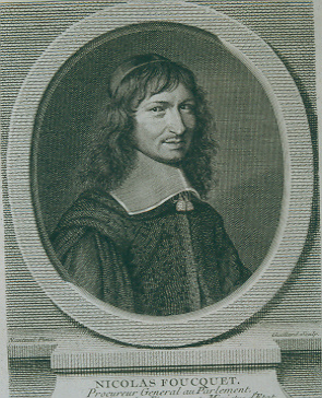 Nicolas Fouquet (1615-1680), surintendant des Finances, ministre d'Etat.